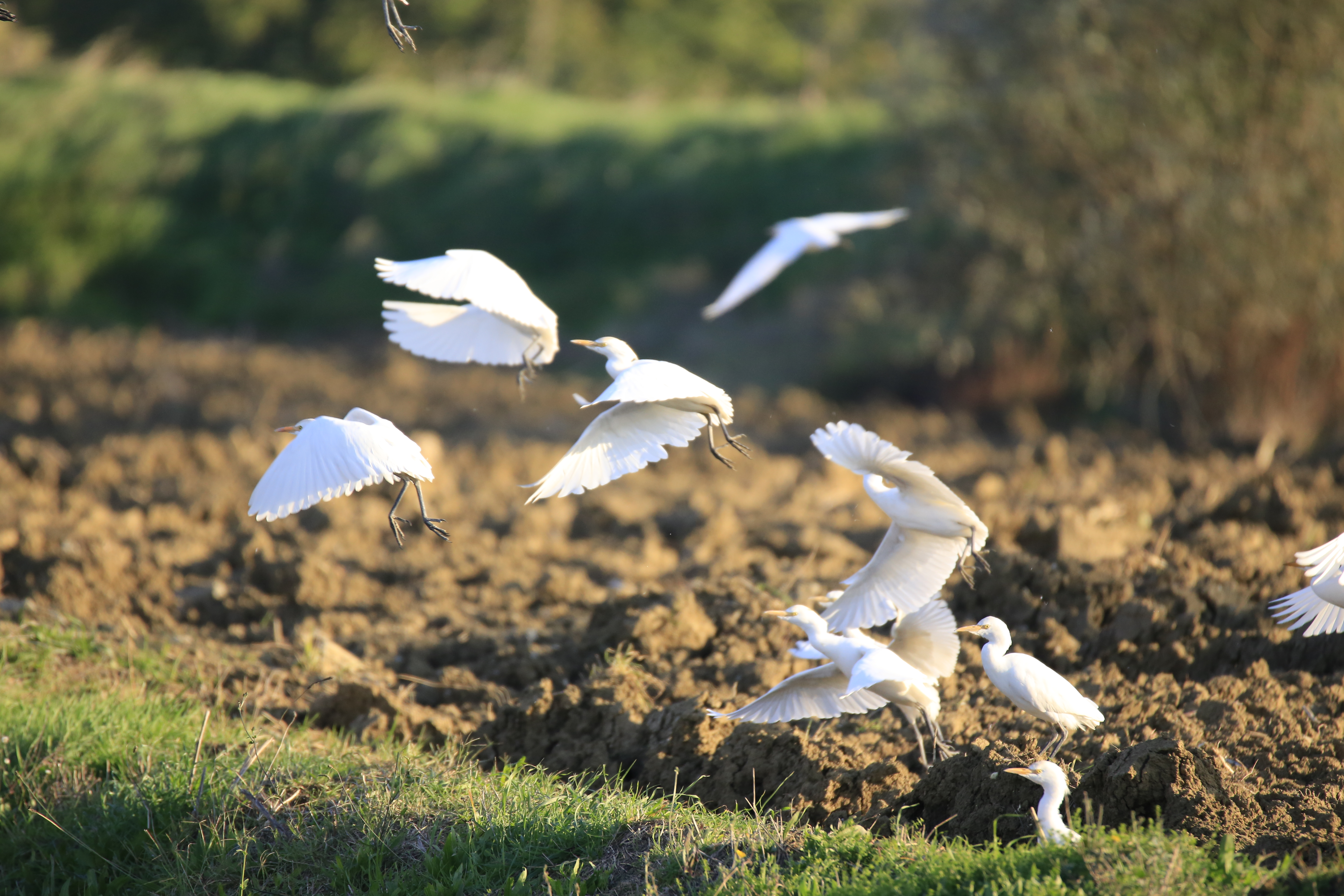 stormo